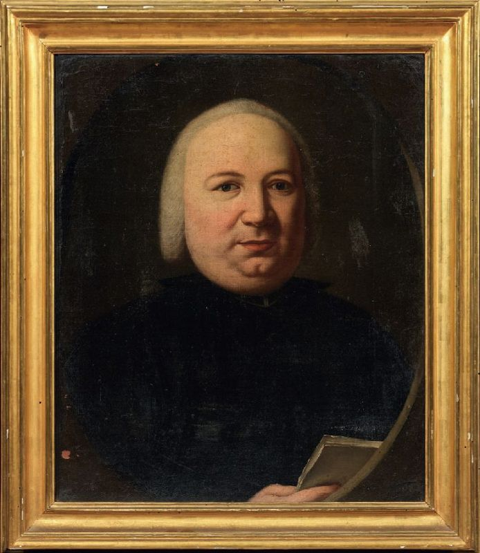 Ritratto di Pompeo Neri, autore anonimo. Collezione Privata